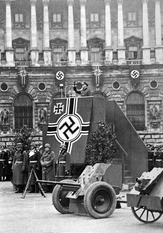 Wien, Heldenplatz, Rekrutenvereidigung Scherl Bilderdienst, Berlin Rekruten weihen ihr Leben dem Führer. Auf dem Wiener Heldenplatz wurden am Sonnabend [9.12.38] die Rekruten des Standortes Wien auf den Führer und Reichskanzler vereidigt. Nachdem die Truppenteile mit klingendem Spiel auf den Heldenplatz gezogen waren und Paradeaufstellung eingenommen hatten, sprach der kommandierende General des 17. AK., General. d. Inf. Kienitz, zu den jungen Soldaten. Unser Bild zeigt General d. Inf. Klienitz bei der Ansprache. 11.12.38 [Herausgabedatum] 16183-38 [Österreich, Wien.- Rekrutenvereidgung auf dem Heldenplatz. General Werner Kienitz bei Ansprach neben Kanonen (3,7-cm Panzerabwehrkanone, leichtes Infanterie-Geschütz 18 / le.I.G. 18)] Abgebildete Personen: Kienitz, Werner: General der Infanterie, Ritterkreuz (RK), Heer, Deutschland